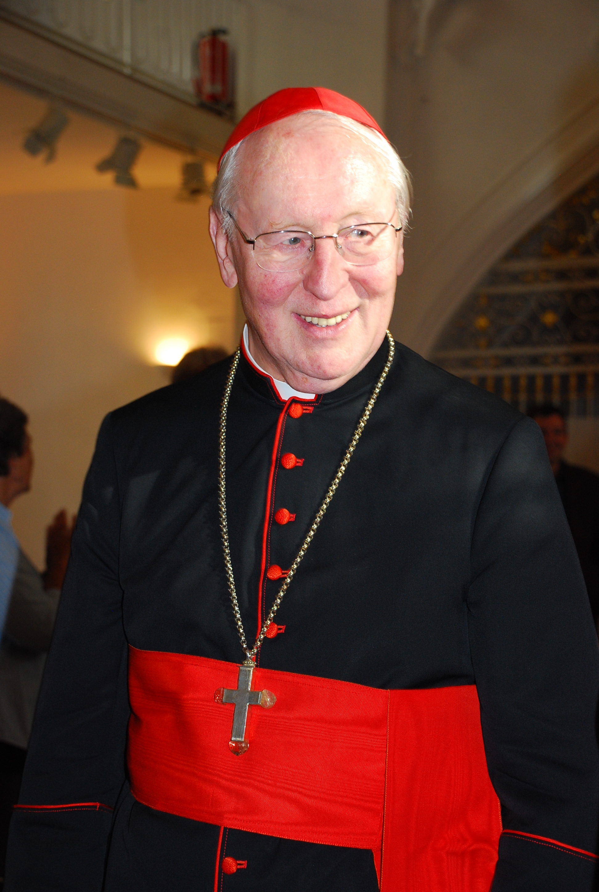 Kardinal Friedrich Wetter bei der Verleihung des Martinsmantels (Sankt Michaelsbund) in der Karmelitenkirche München